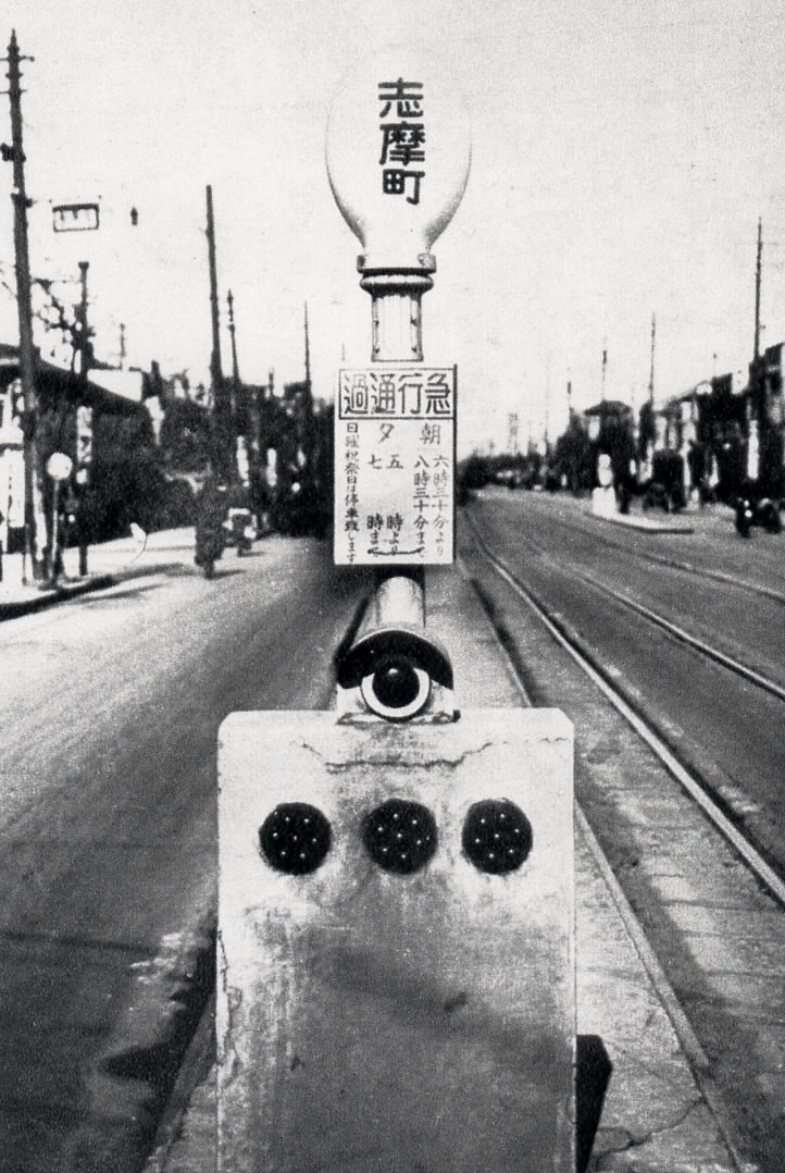 急行電車の通過を知らせる志摩町電停標識